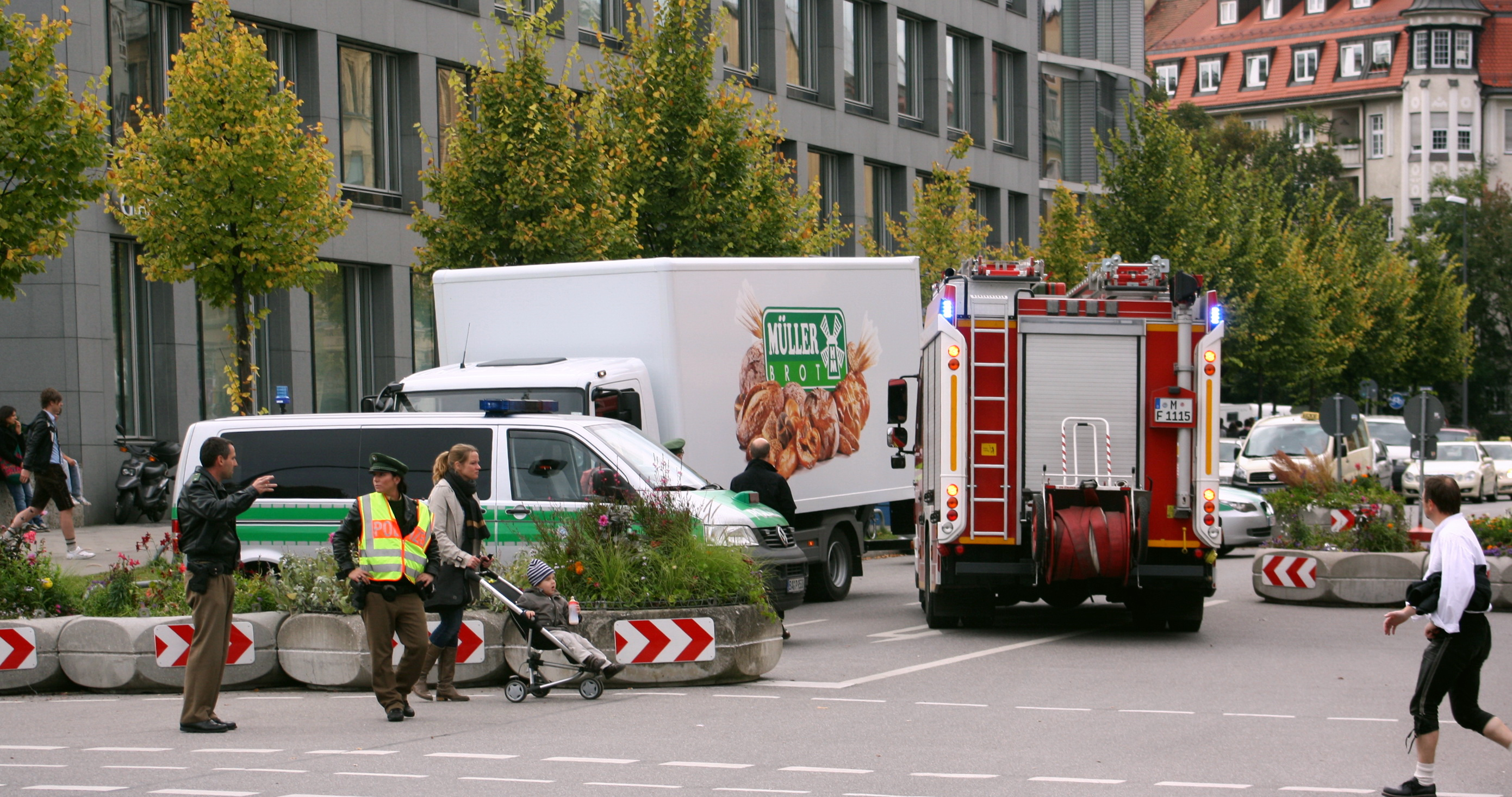 Feuerwehrwagen mit Sondersignalen bei der Durchfahrt durch den Absperrring, der anlässlich des Oktoberfestes 2010 errichtet wurde. Kontollbeamte der Bayrischen Polizei mit Fahrzeug an der Straßensperre. Örtlichkeit - München, Alter Messeplatz.